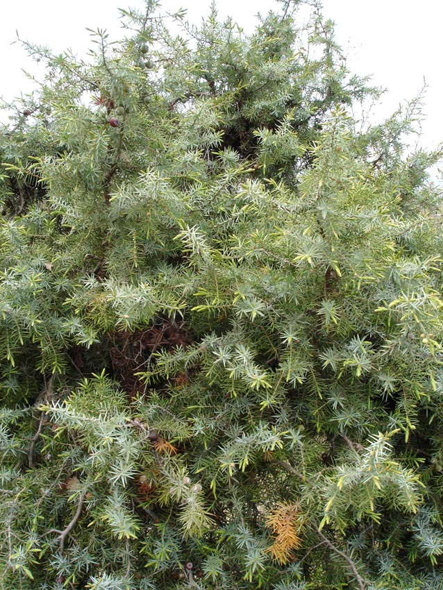 Juniperus oxycedrus à Corbère-les-Cabanes (Pyrénées-Orientales, France)